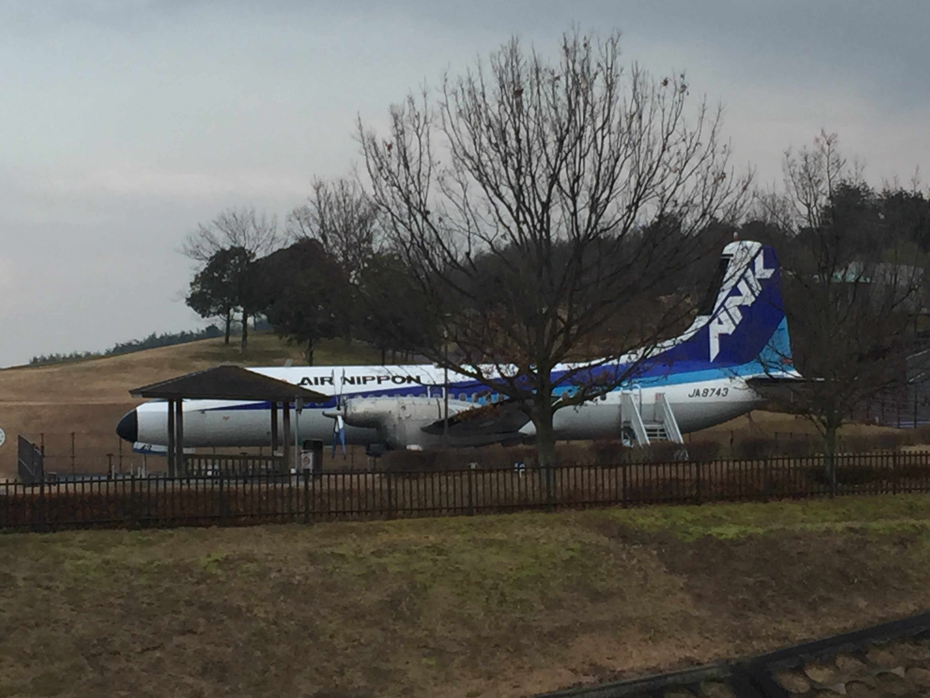 展示於日本香川縣高松市讚岐兒童之國的日本自製民航機YS-11